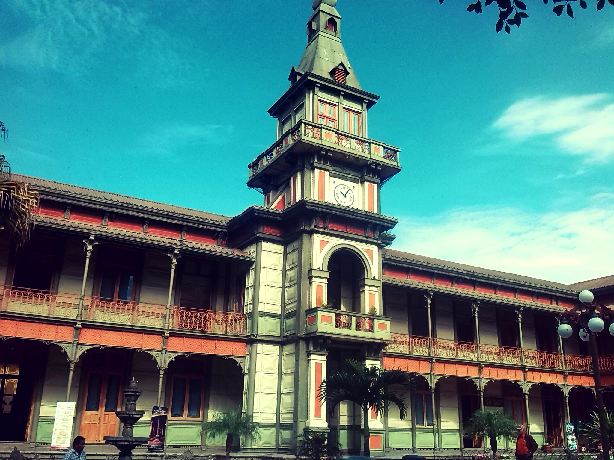 Palacio de hierro de Orizaba, Veracruz